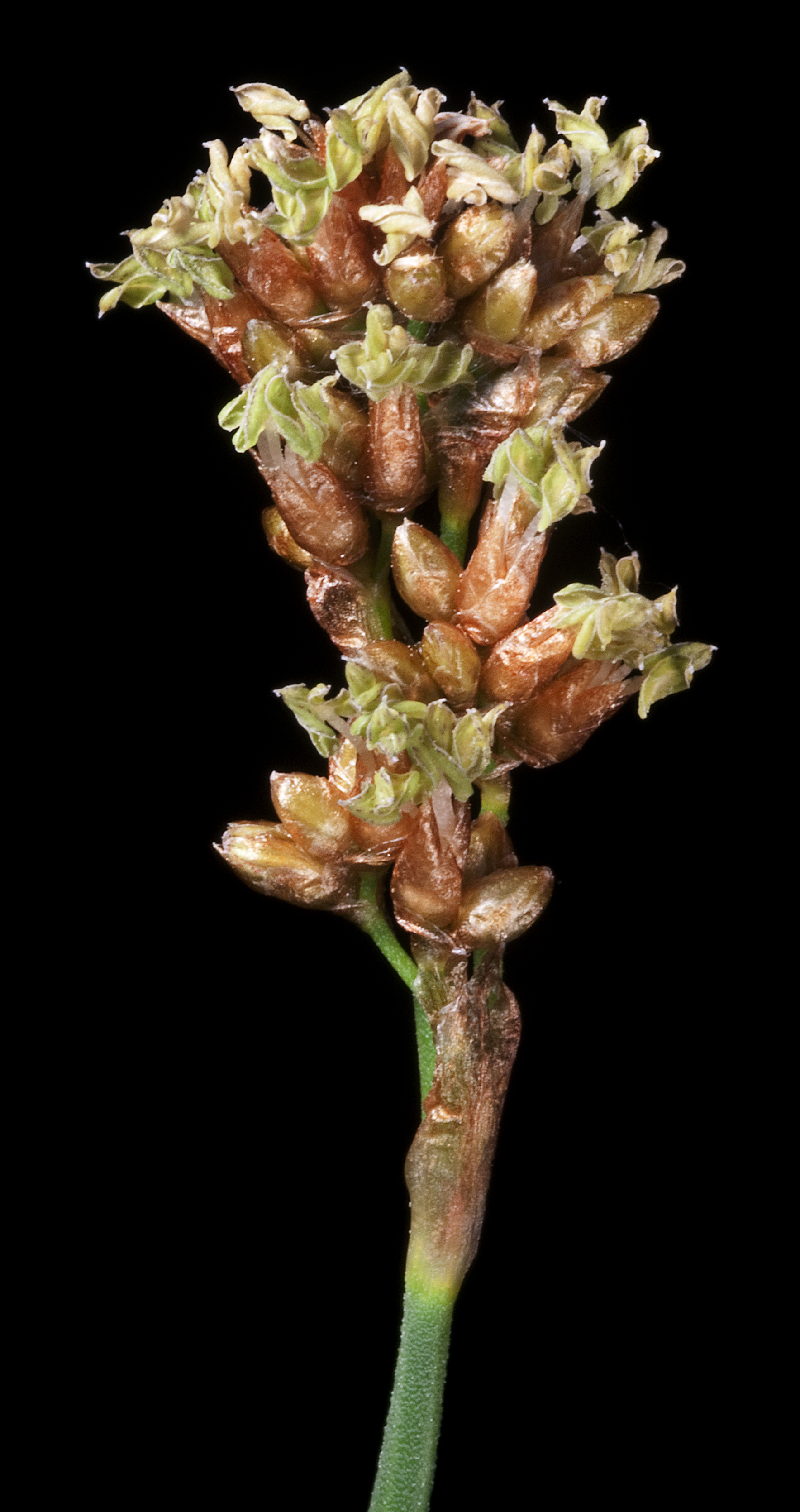 PERTH7999259